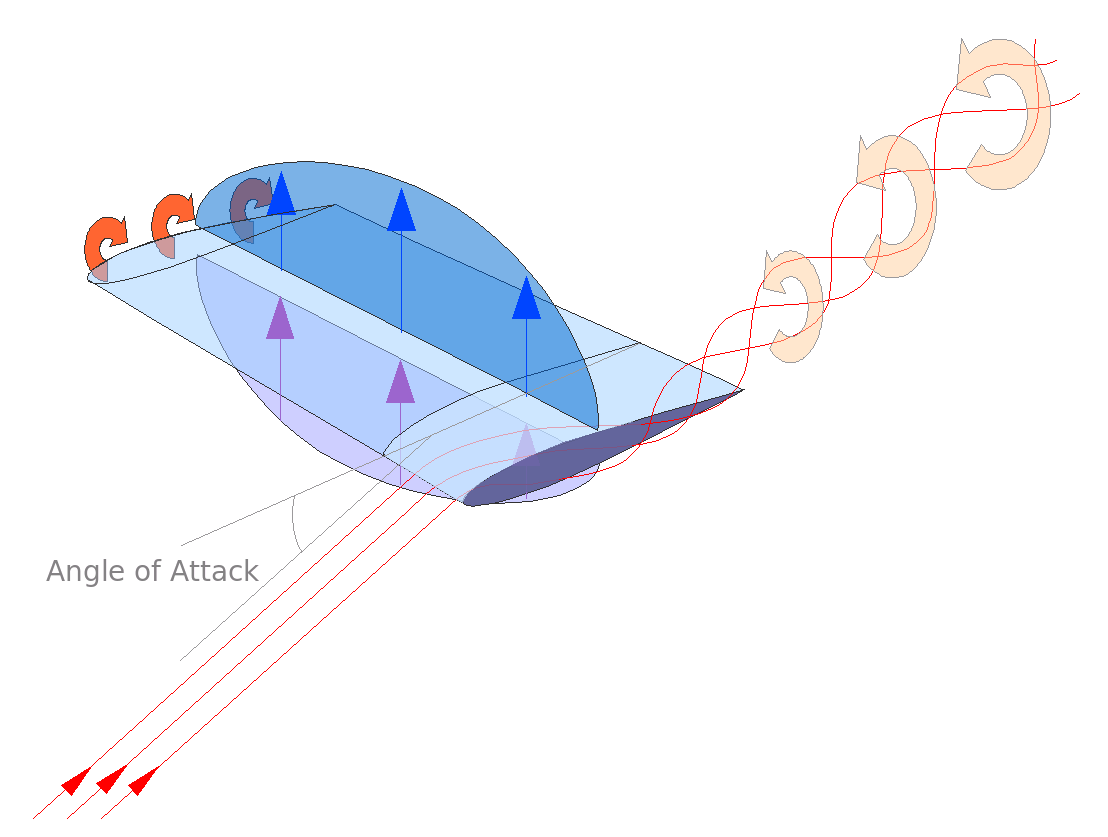 Druckverteilung und Induzierter Strömungswiderstand an einem Flügel